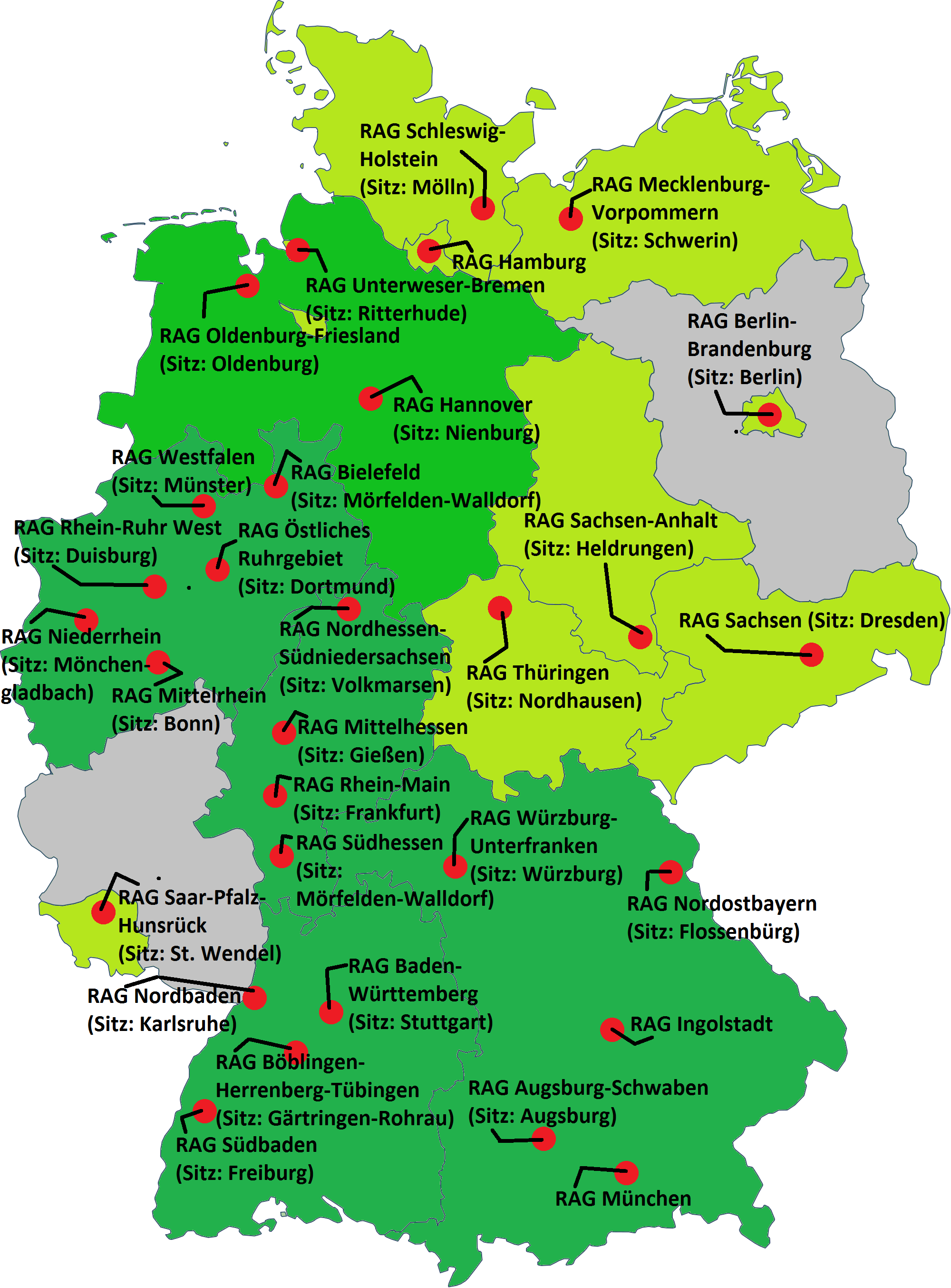 Die Regionalen Arbeitsgruppen (RAGs) des Vereins "Gegen Vergessen - Für Demokratie e.V." im Jahre 2011.